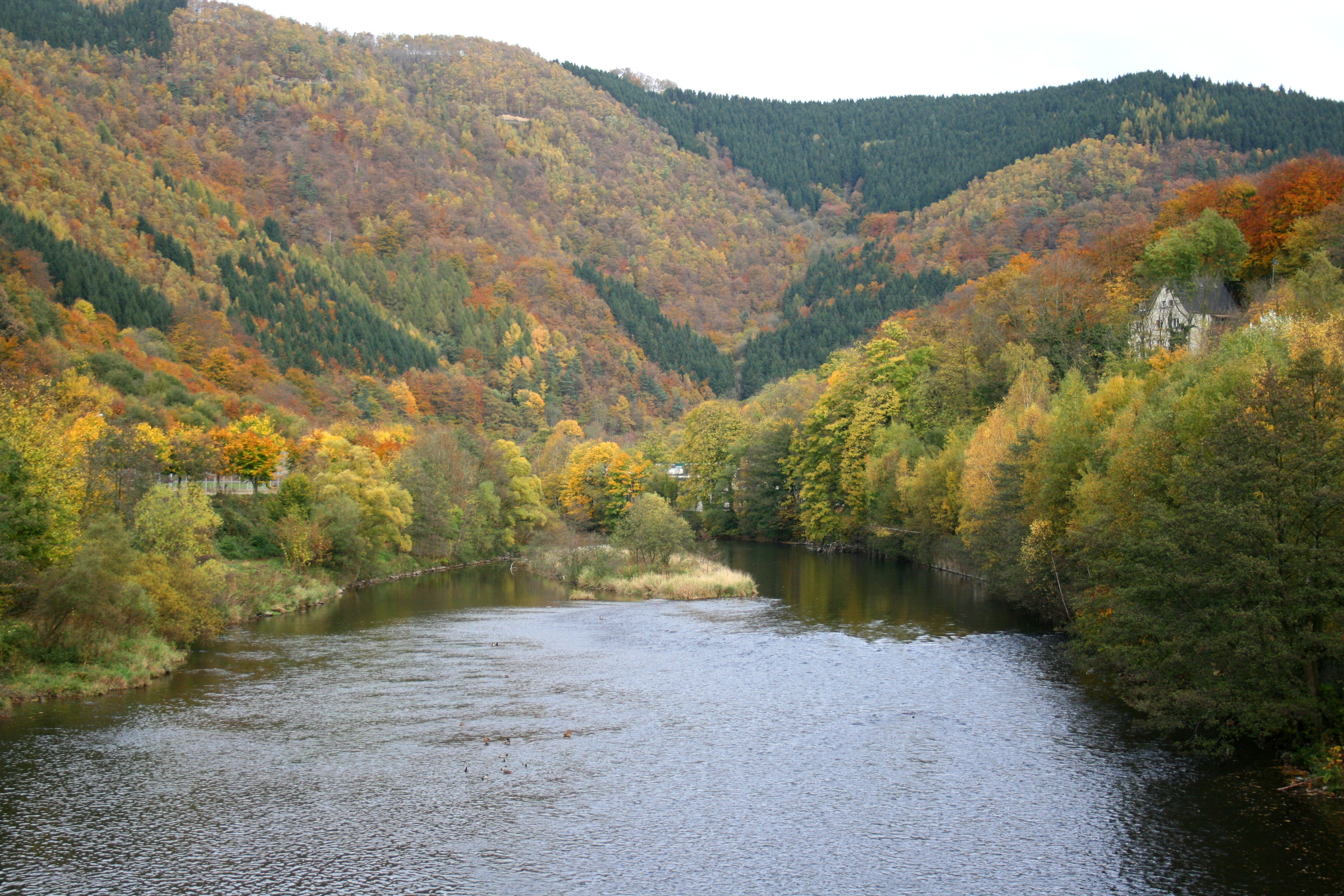 Lenne bei Pragpaul in Altena; Blick von der Brücke Hermann-Voß-Straße nach Norden; Fluss und Wald links im Bild (weitgehend) im Naturschutzgebiet „Pragpaul“ (NSG MK-099)